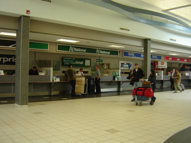 Saskatoon John G. Diefenbaker International Airport